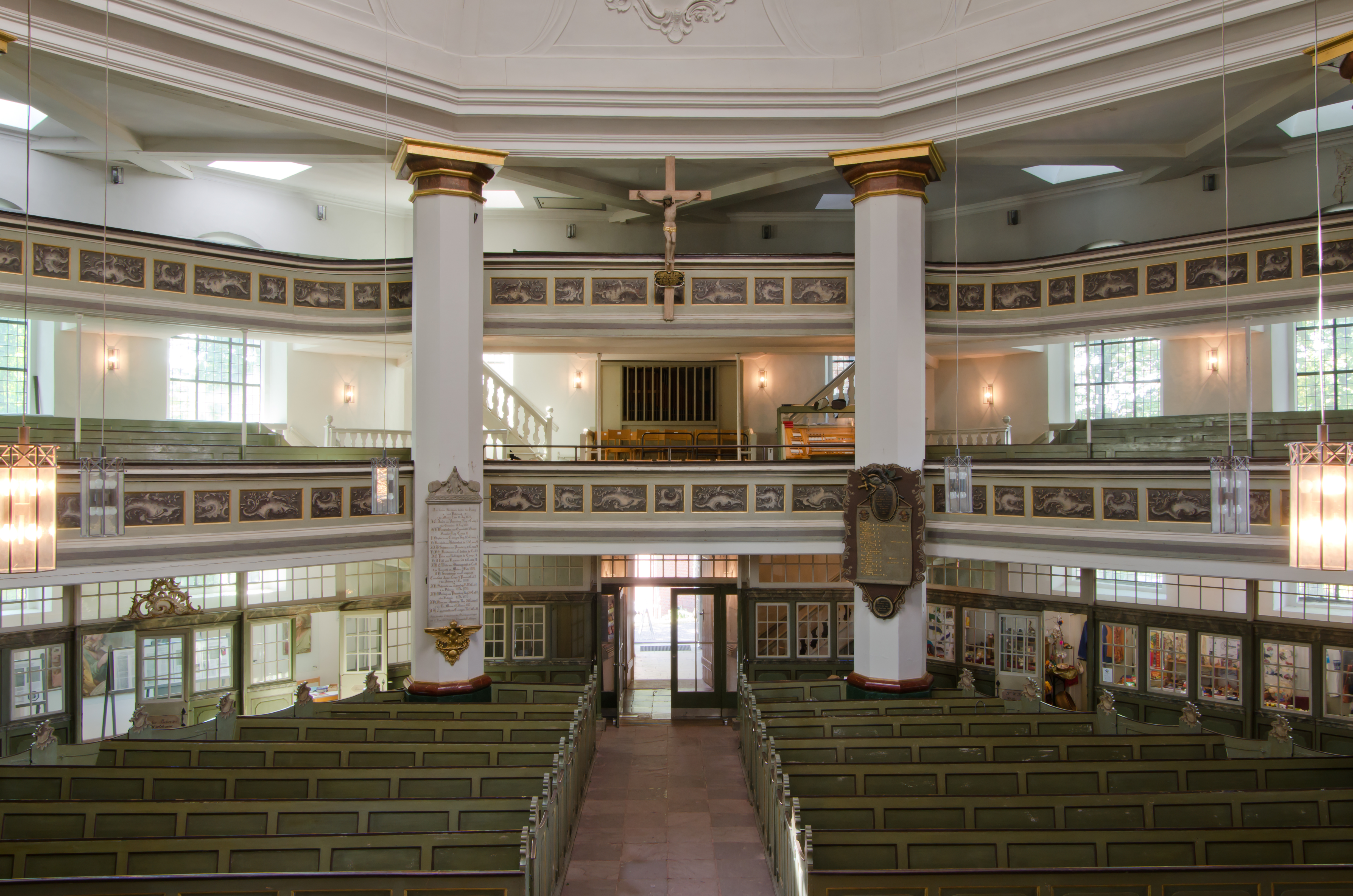 Rellinger Kirche - Blick von der Kanzel